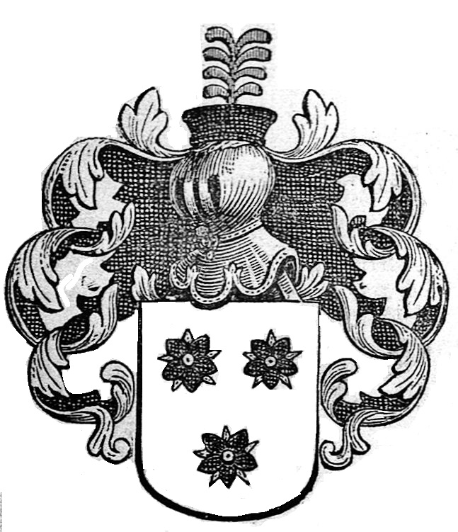 PRAENOBLIS Familia ex Belg.